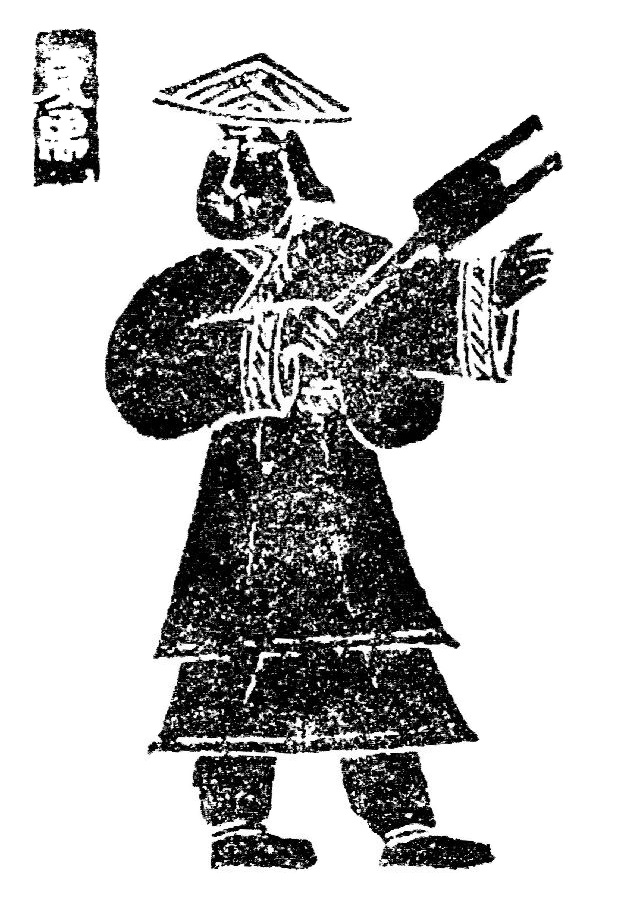 大禹治水圖Bân-lâm-gú: Tāi-ú tī-tsuí-tôo. 大禹治水圖。